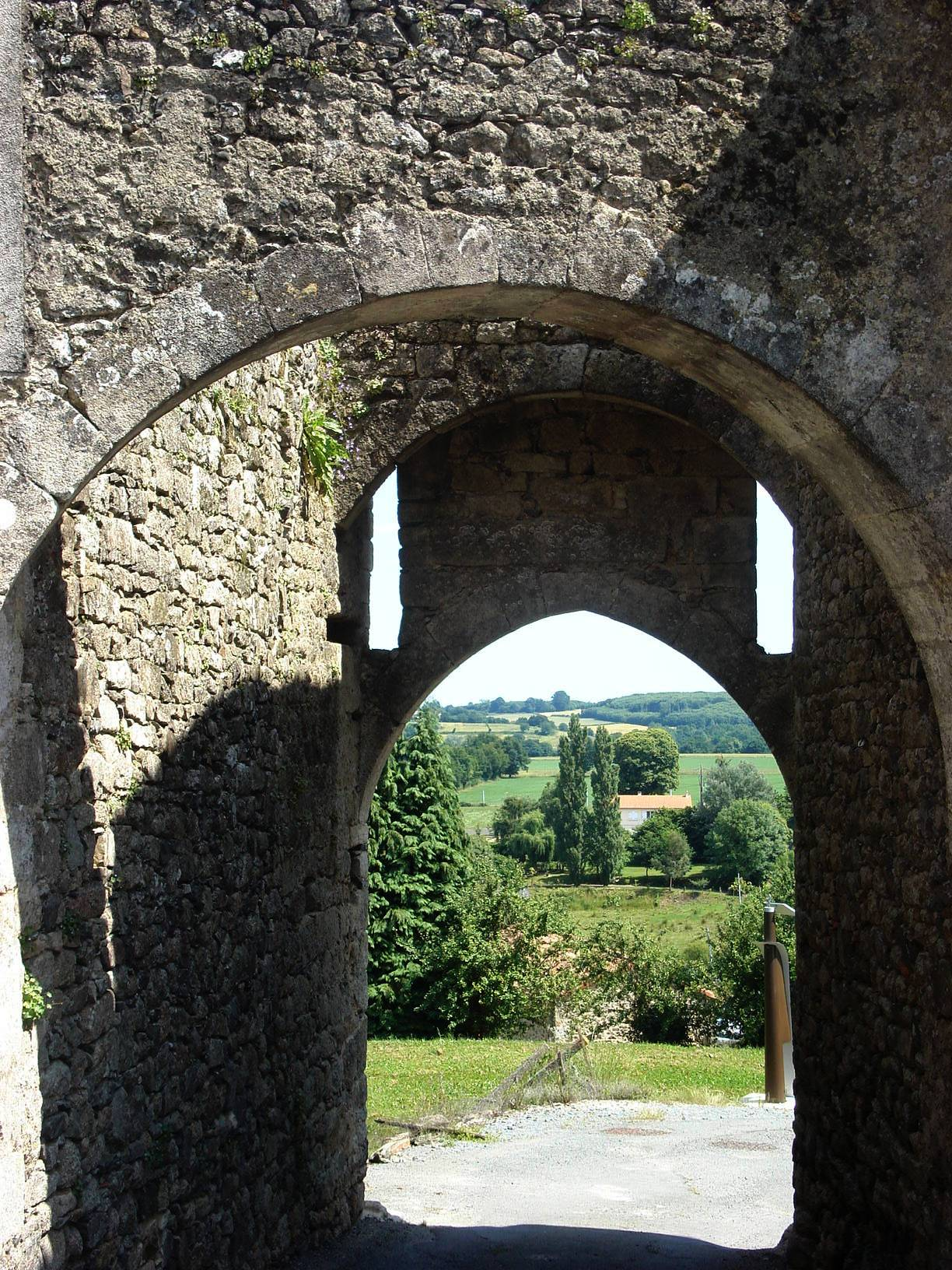 Donjon de Châteaumur, (Inscrit, 1979) .